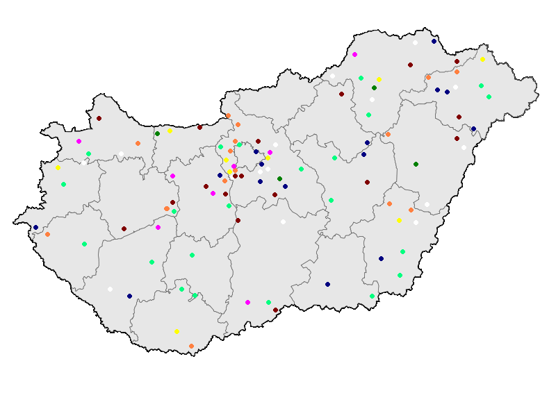 Magyarország új városai, 2000–2009 2000 – narancssárga 2001 – fehér 2003 – zöld 2004 – vörös 2005 – kék 2007 – sárga 2008 – rózsaszín 2009 – világoszöld